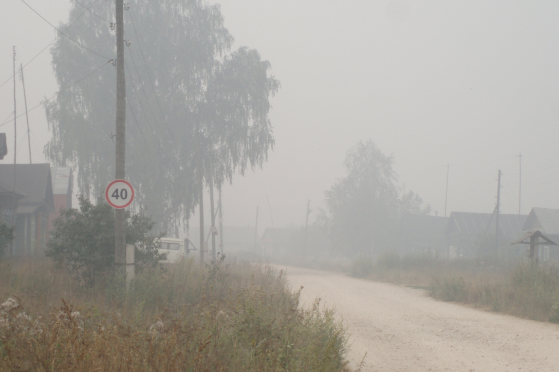 Аномально жаркое и сухое лето в 2010 году привело к многочисленным повсеместным пожарам. Пожары в Нижегородской области заволокли дымом Муромский заказник на несколько недель.